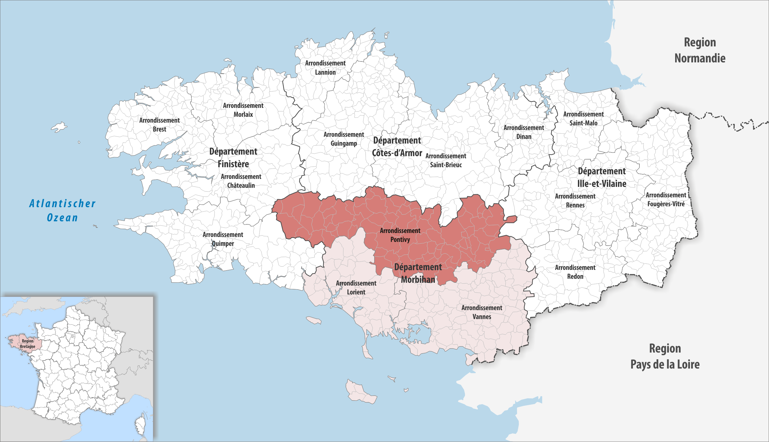 Lage des Arrondissements Pontivy